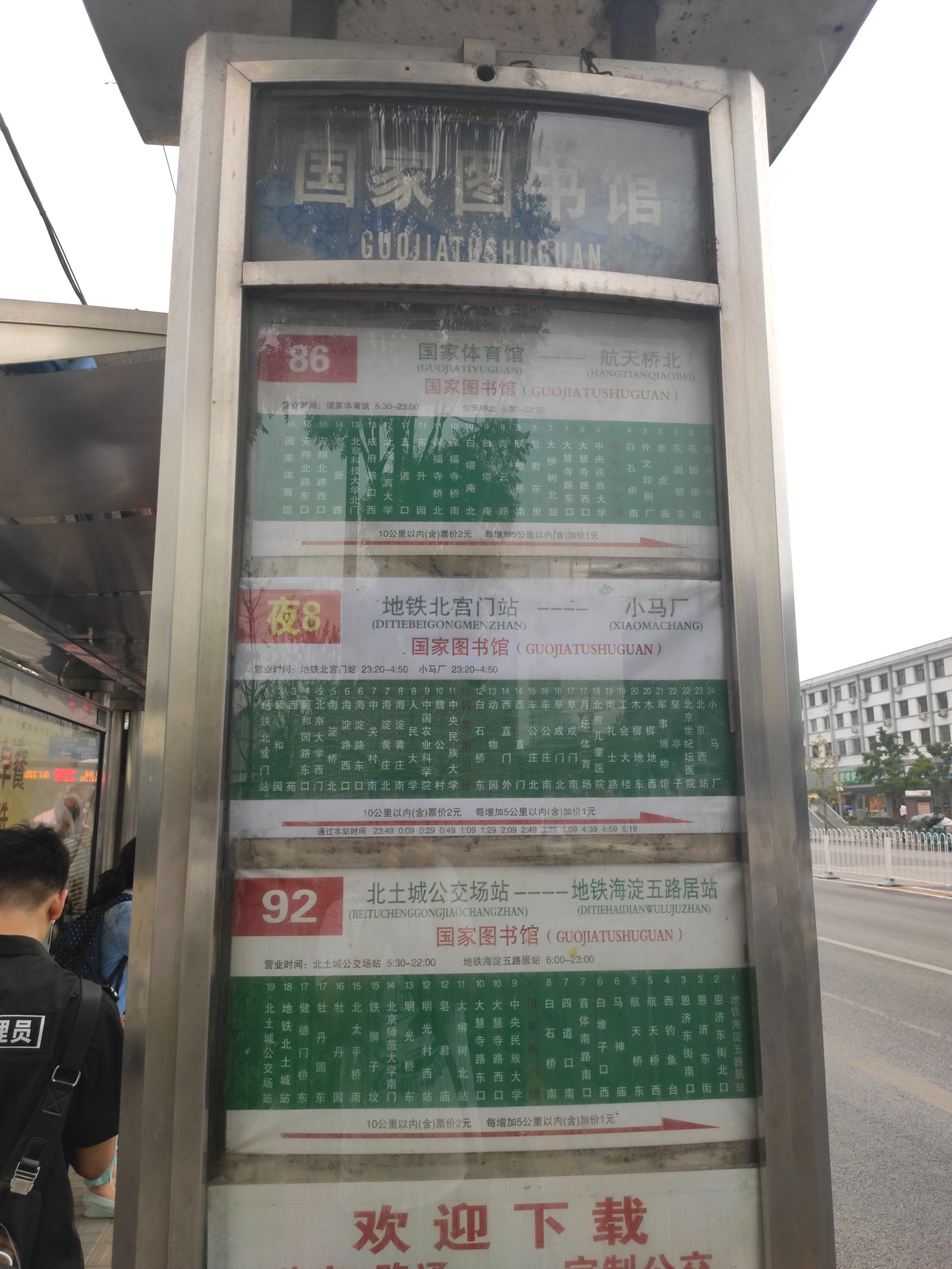 国家图书馆公交站